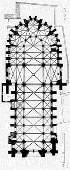 plan de l'église Notre-Dame de Mouzon, par Émile Boeswillwald (1815 - 1896) : plan de 1855 c'est à dire avant restauration